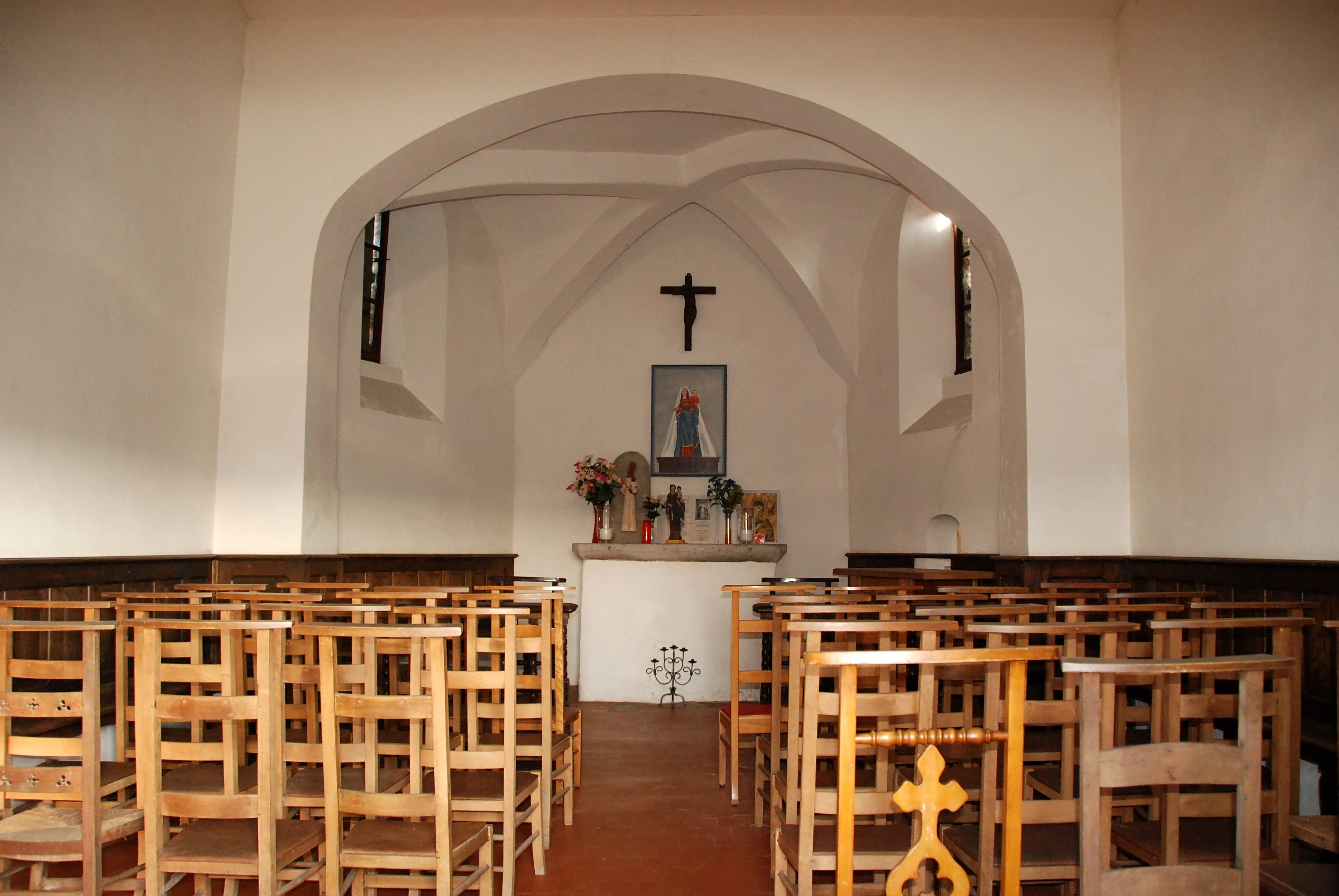 Belgique - Wallonie - Bousval - Chapelle du Try-au-Chêne